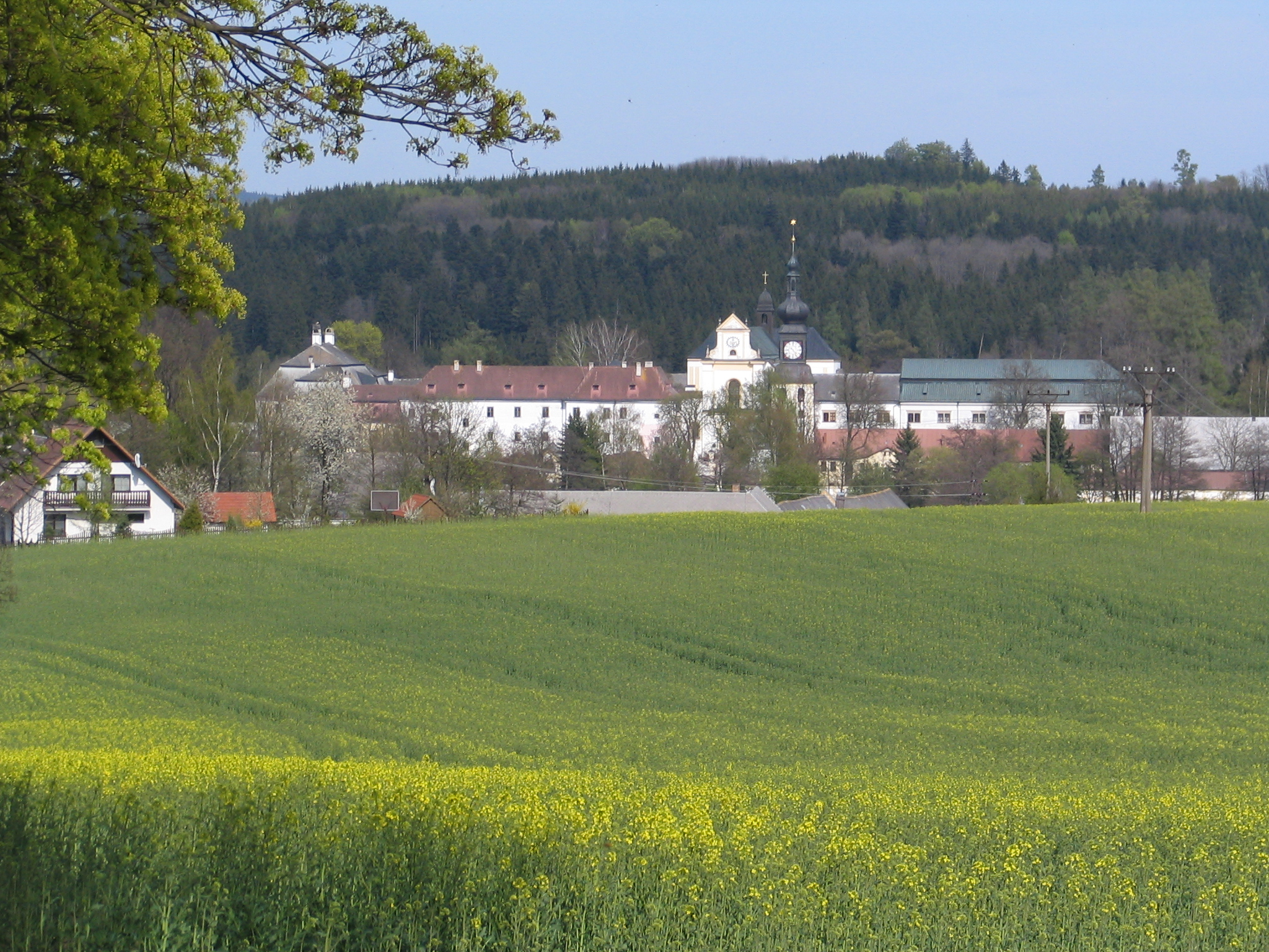 Zámek s areálem Žďár nad Sázavou, Zámek 1, Žďár nad Sázavou